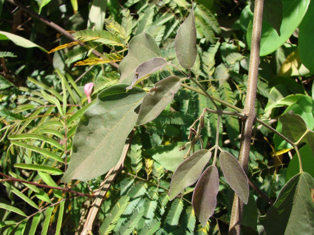 Fridericia chica (Bonpl.) L.G.Lohmann - (sin. hom. Arrabidaea chica (Bonpl.) Verl.) - BIGNONIACEAE - Parque Olhos D'Água - Brasília - Distrito Federal - Brasil.